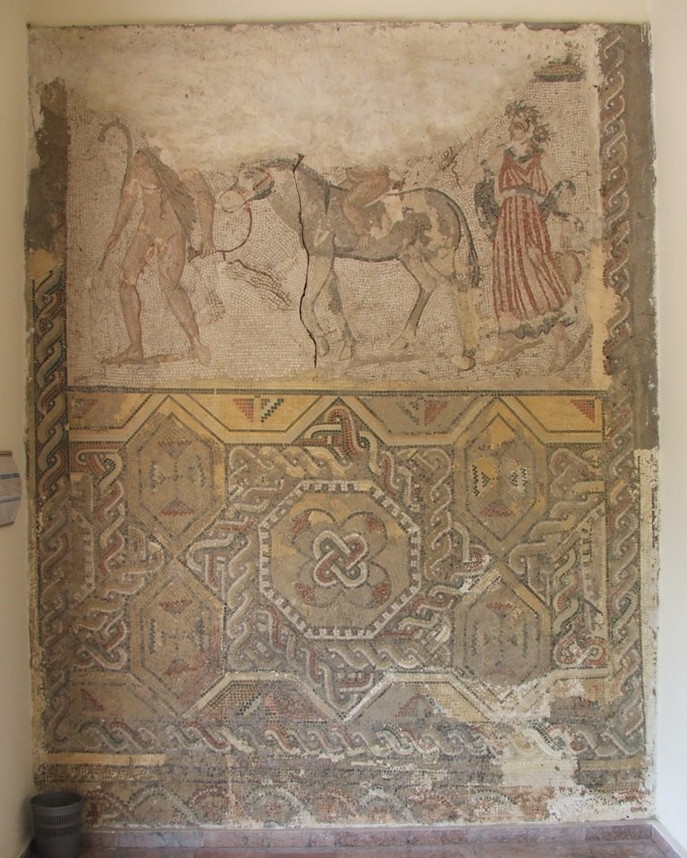 Mosaico romano procedente de Lixus en el Museo Arqueológico de Tetuán